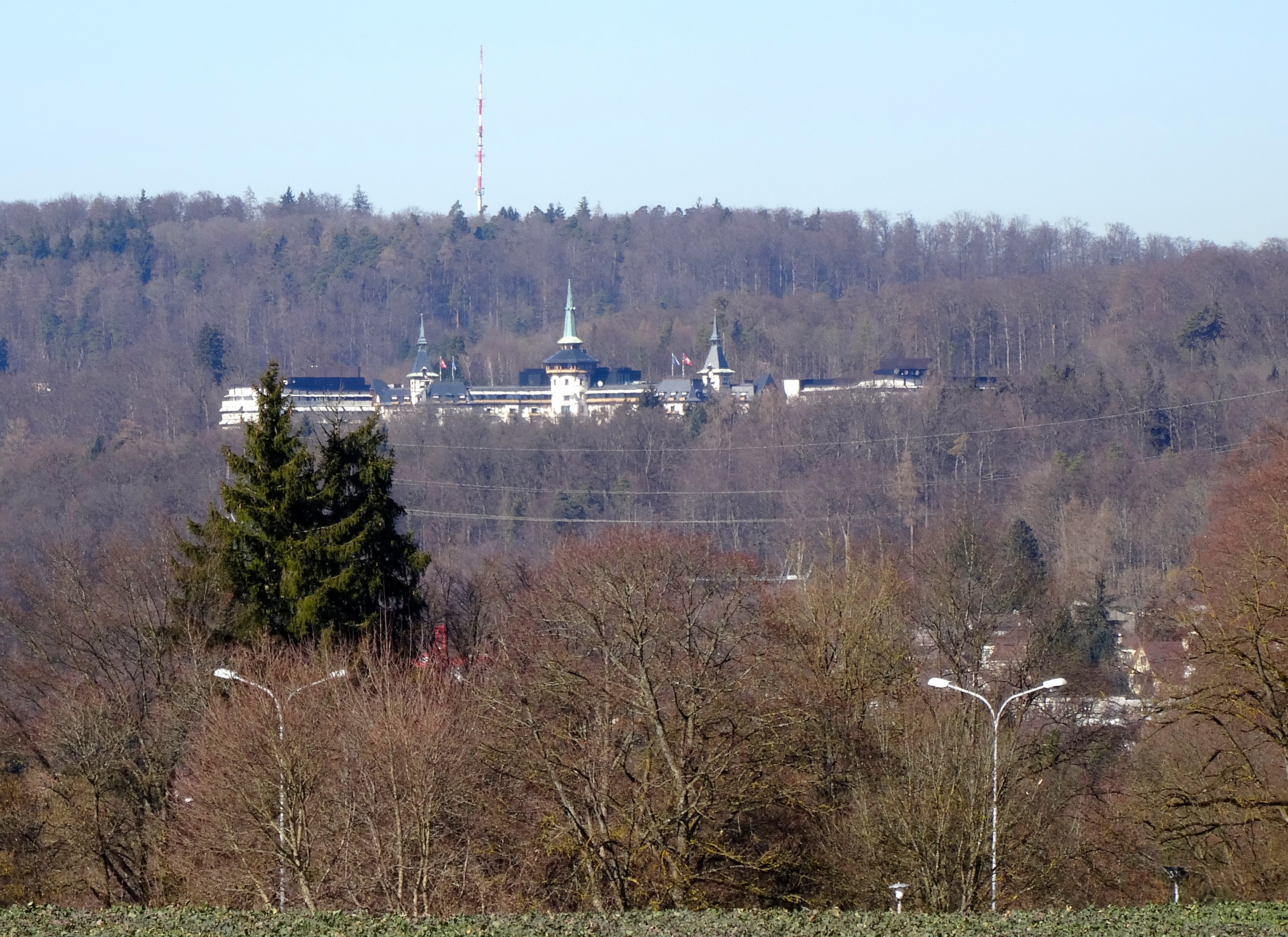 The Dolder Grand, Ansicht von Zollikon